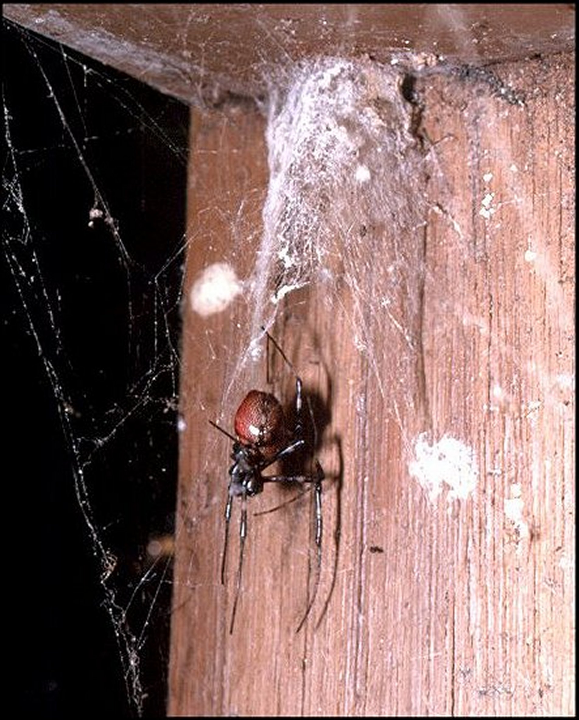 Nephilengis borbonica, femelle dans sa toile,sous l'orifice de la retraite. Vue latéro-dorsale droite. Hangard, Salazie, île de la Réunion.